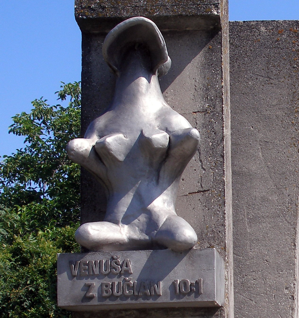 Odpočívadlo pri diaľnici D1 v katastri obce Červeník, okres Hlohovec.Plastika - Venuša z Bučian, nájdená pri výstavbe diaľnice v roku 1978. Kultová, neolitická soška zobrazujúca ženu - rodičku - matku.